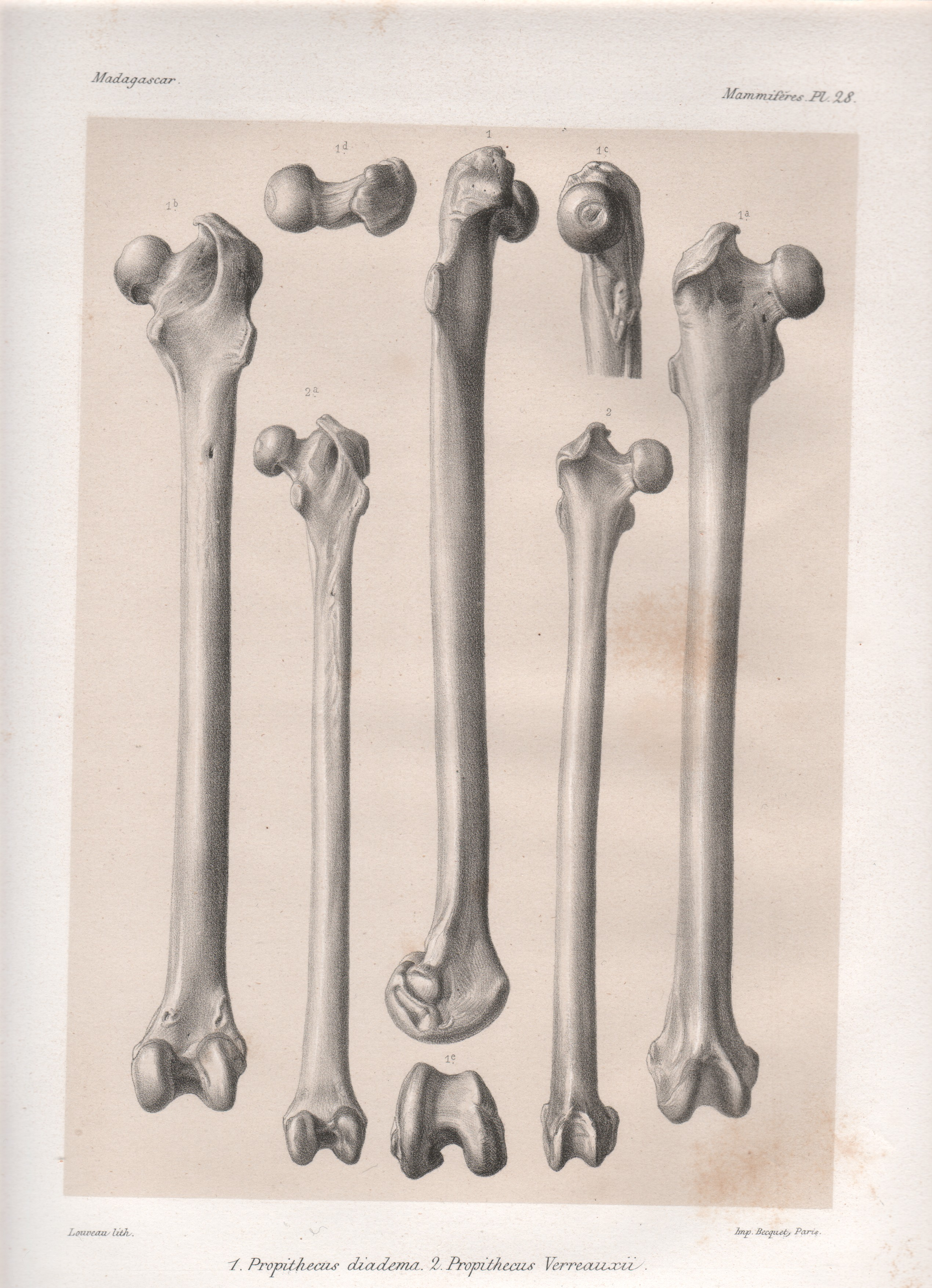 historische Darstellung der Anatomie eines 1. Diademsifaka (Propithecus diadema) und 2.Larvensifaka (Propithecus verreauxi)